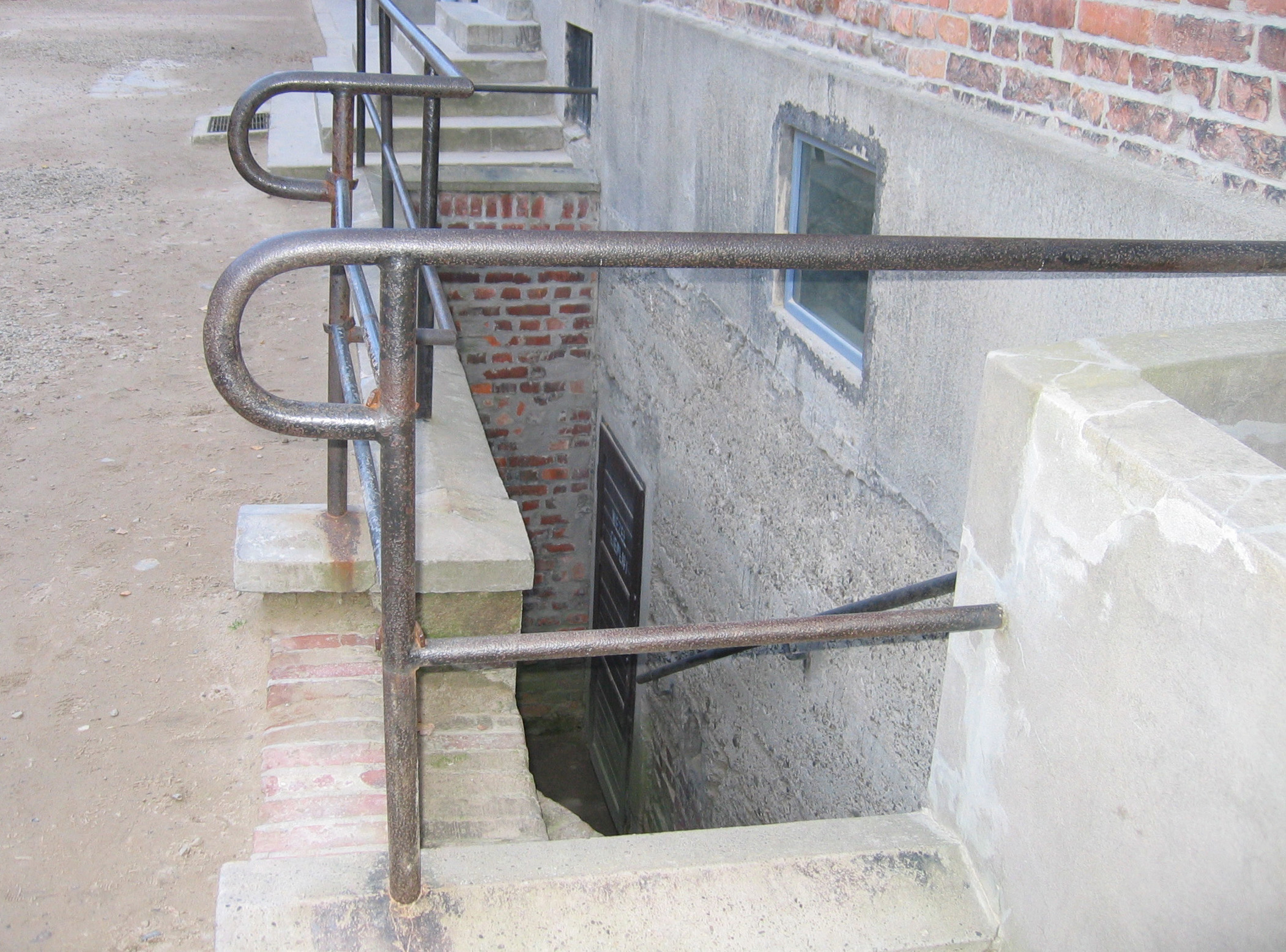 Kellerausgang vom "Todesblock" 11 im Stammlager, im Hof zwischen Block 10 und 11 befindet sich die die "Schußwand"